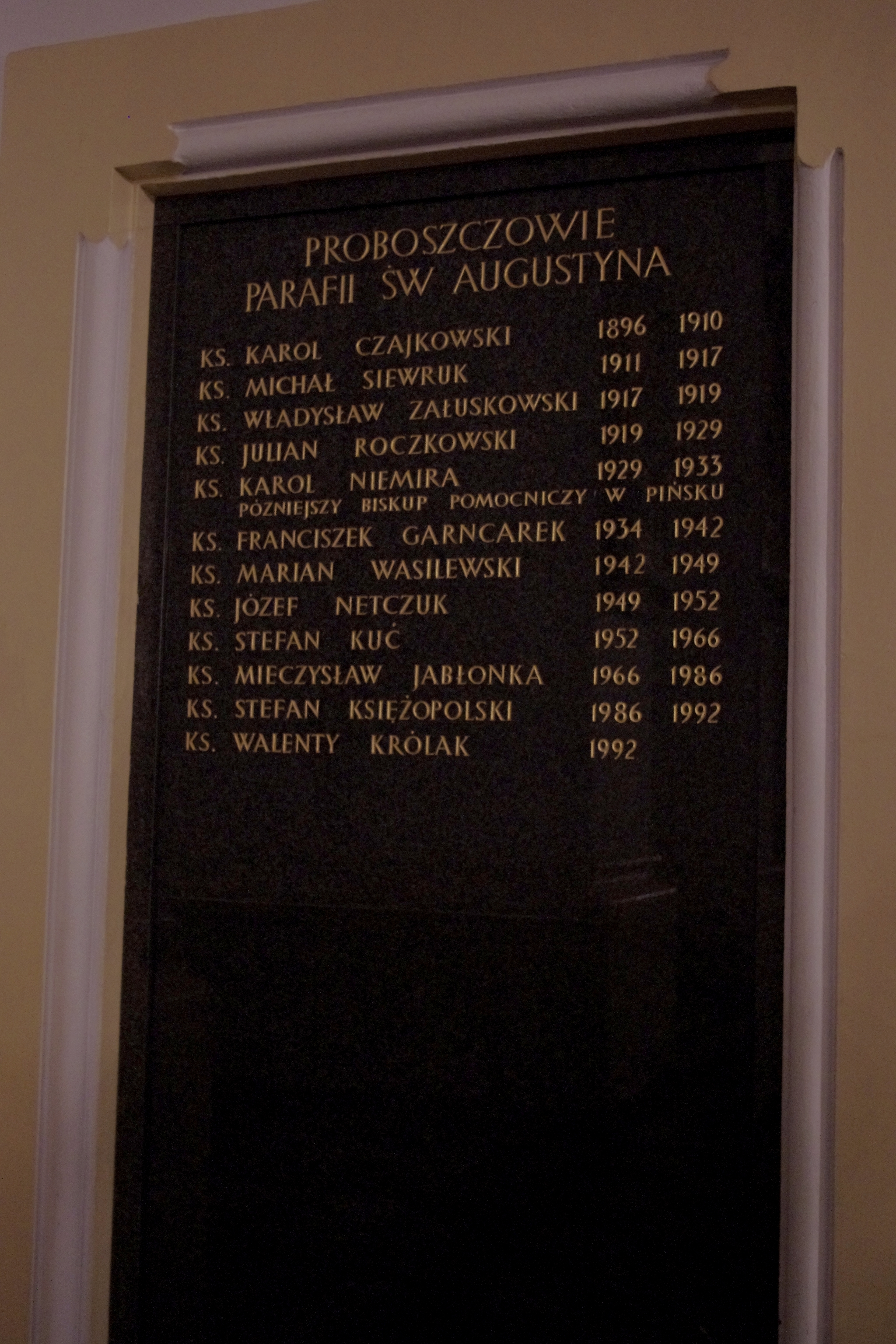 Tablica z listą proboszczów parafii św. Augustyna na warszawskim Muranowie. Tablica zawiera nazwiska: Ks. Karol Czajkowski (1896 – 1910) Ks. Michał Siewruk (1911 – 1917) Ks. Władysław Załuskowski (1917 – 1919) Ks. Julian Roczkowski (1919 – 1929) Ks. Karol Niemira (1929 – 1933) Ks. Franciszek Garncarek (1934 – 1942) Ks. Marian Wasilewski (1942 – 1949) Ks. Józef Netczuk (1949 – 1952) Ks. Stefan Kuć (1952 – 1966) Ks. Mieczysław Jabłonka (1966 – 1986) Ks. Stefan Księżopolski (1986 – 1992) Ks. Walenty Królak (1992 – dalej sprawuje urząd)